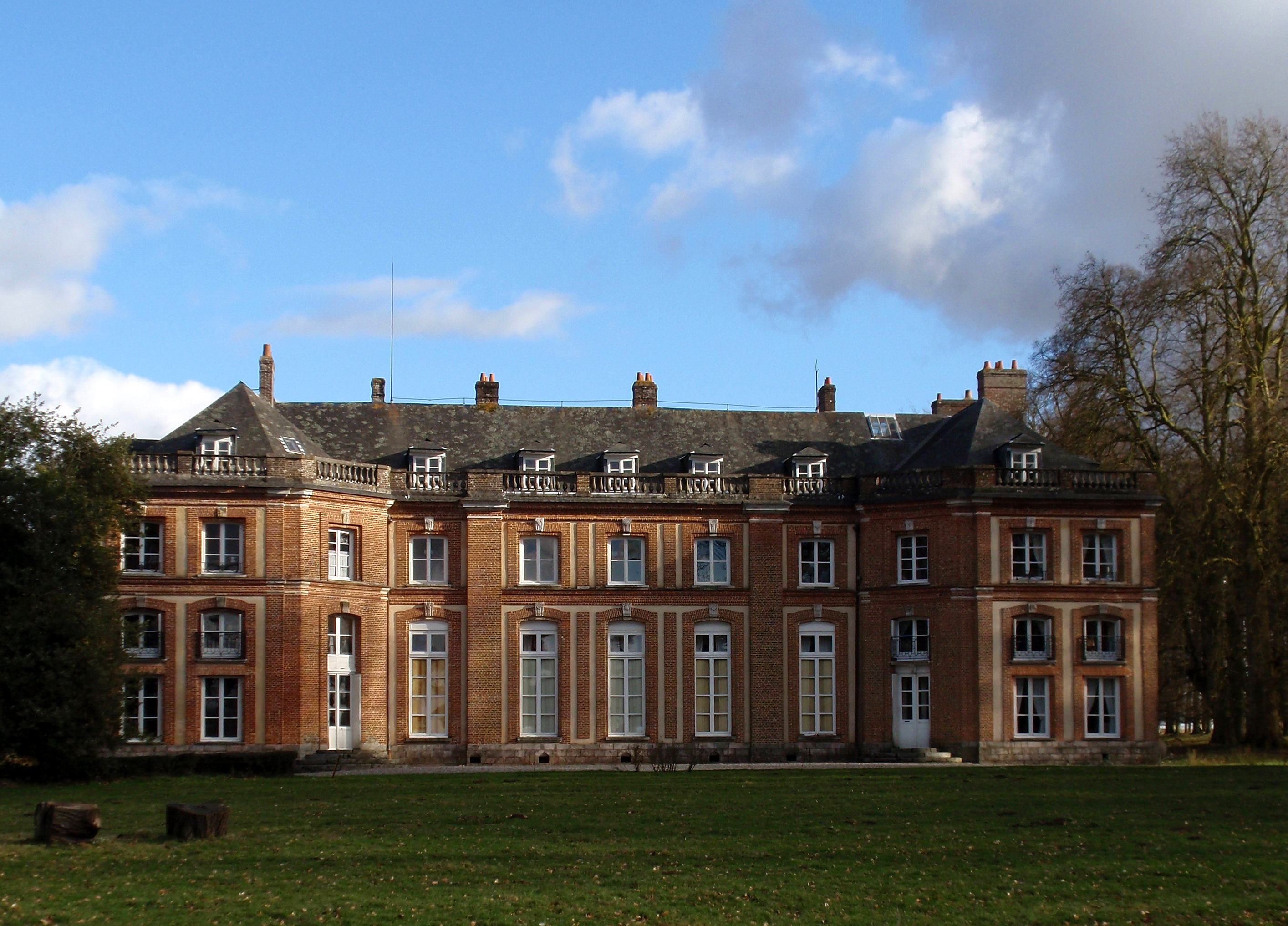 Tôtes (Seine-Maritime, France) Le château de Belloy.